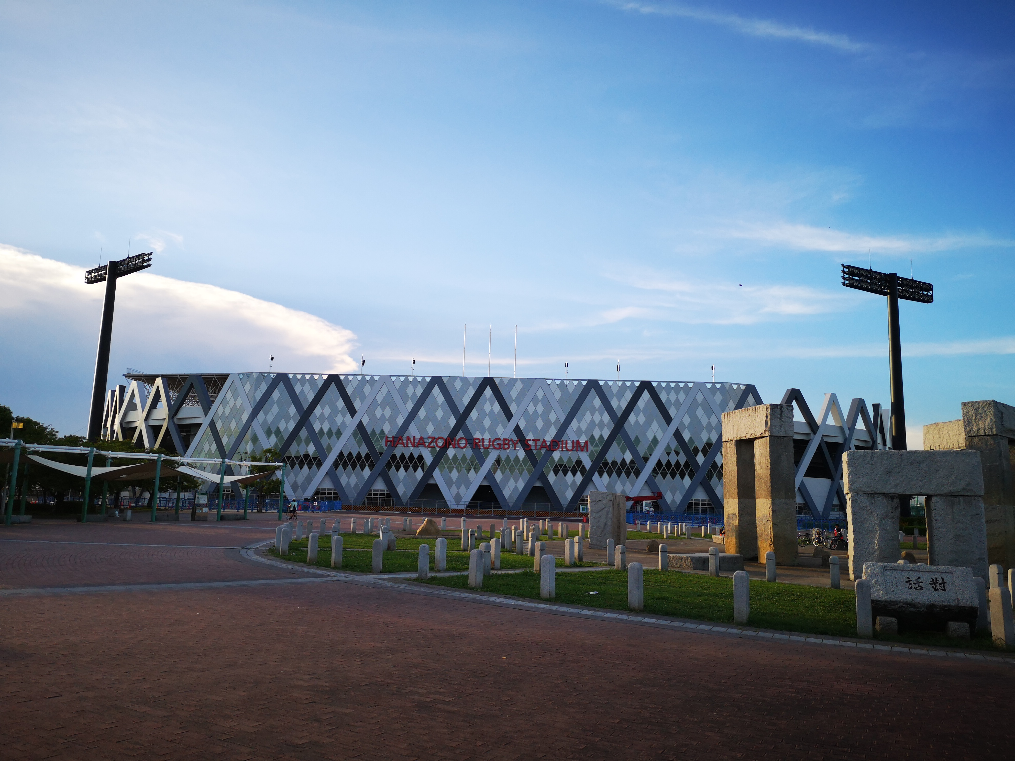 改修された東大阪市花園ラグビー場 2018年